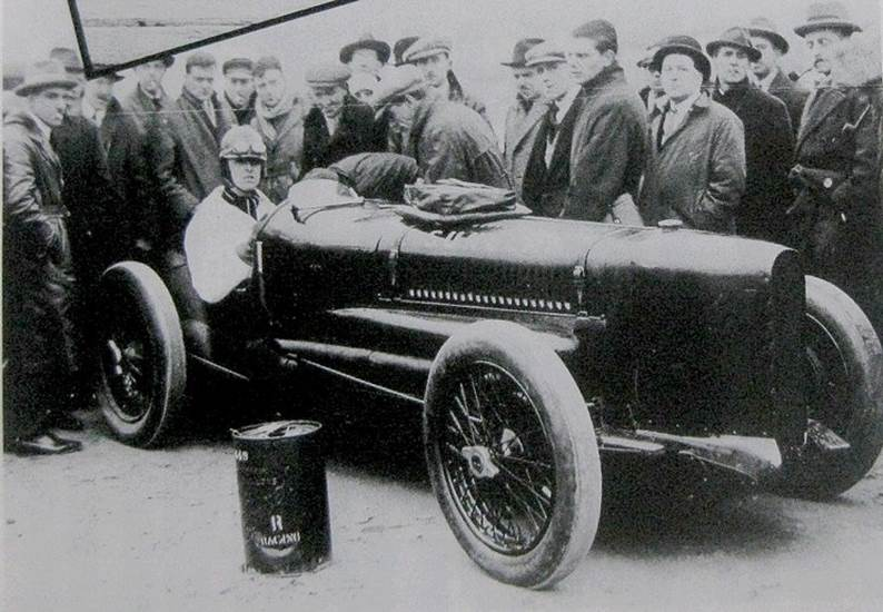 Henry Segrave al volante del Sunbeam Tiger V12 306 HP (1926)